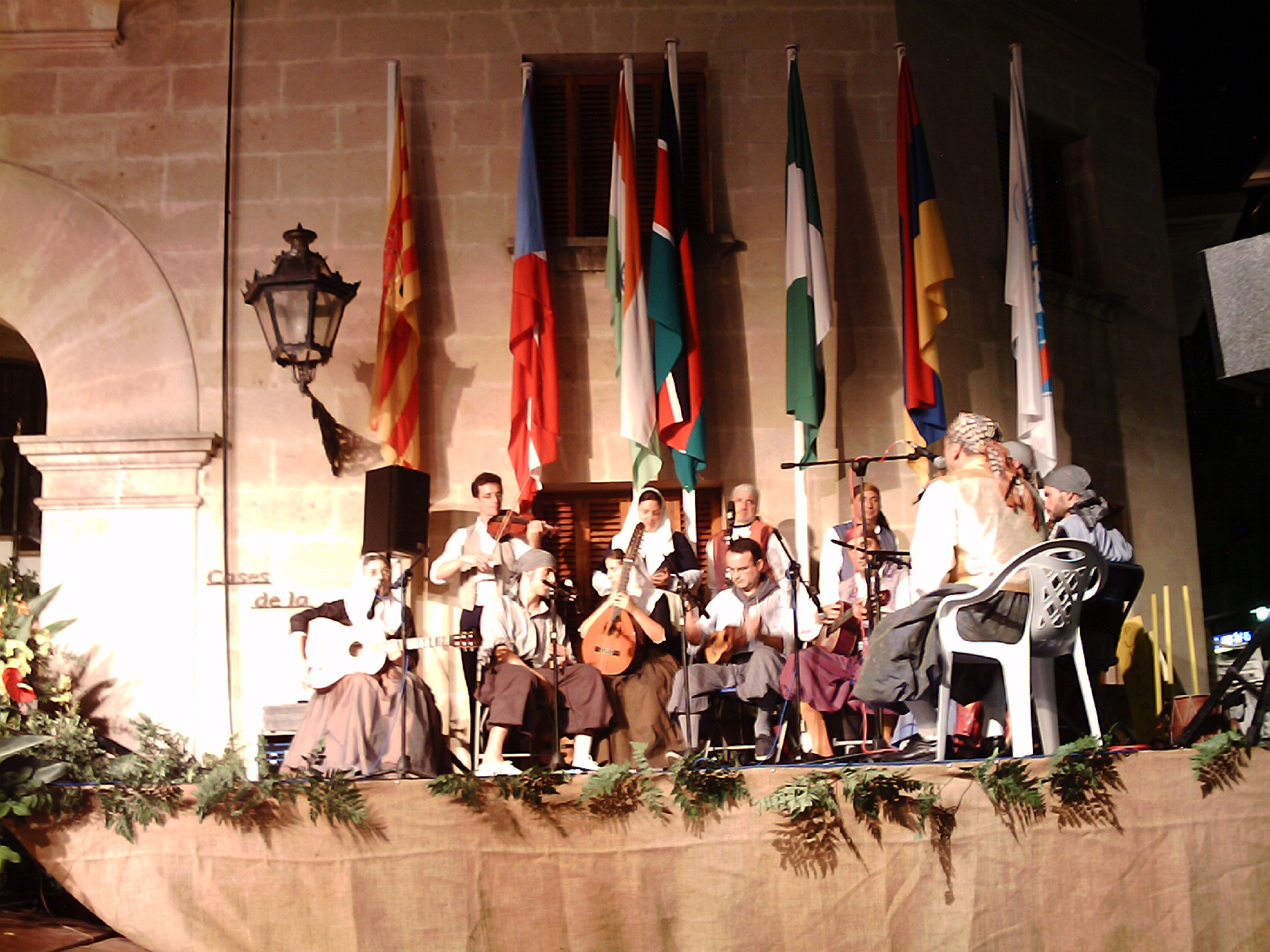 Músics Mallorquins a la Mostra Folclòrica de Sóller, 2006 Autor: P. Pérez